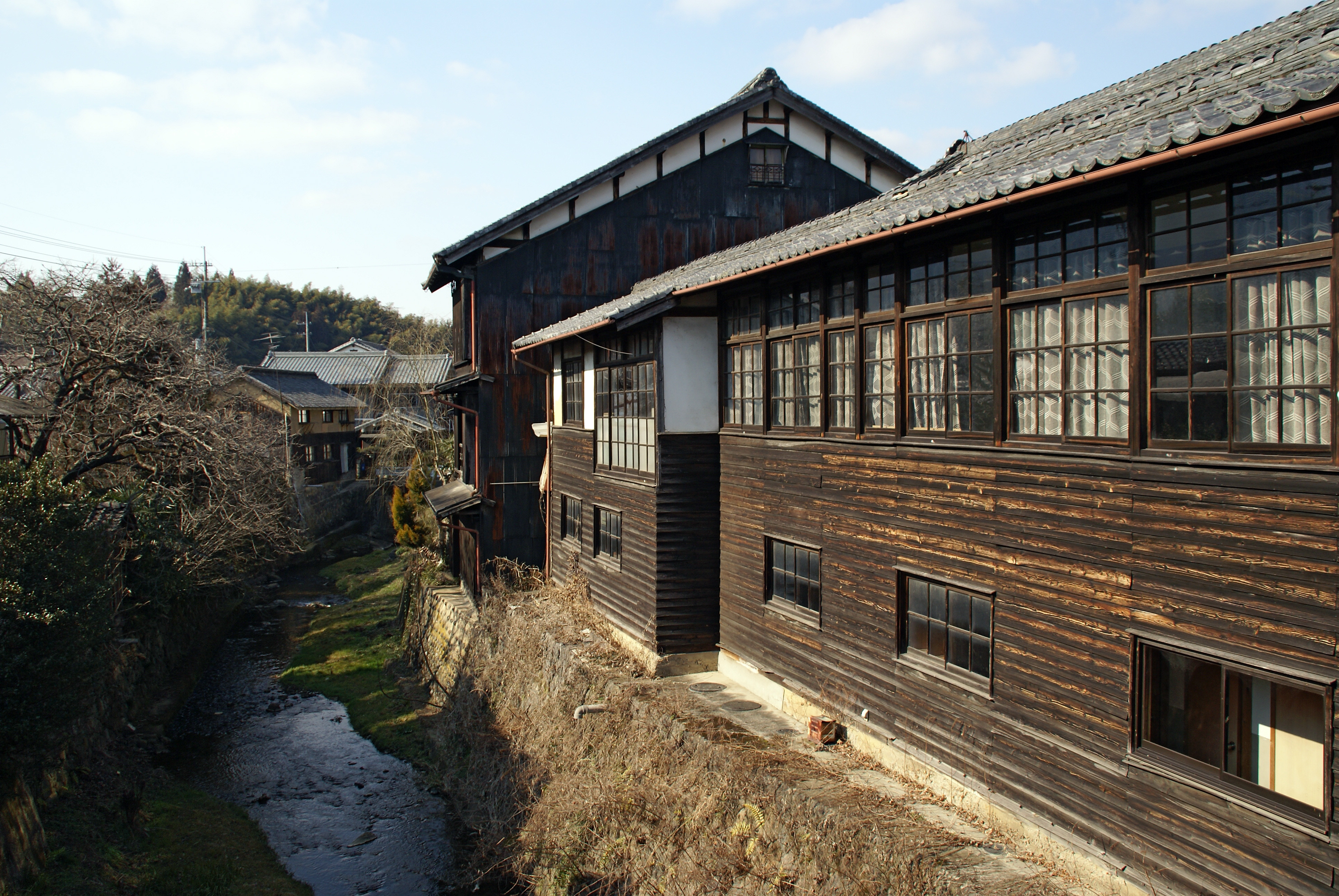 Matsuyama in Uda, Nara prefecture, Japan